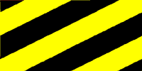 Drapeau de la principauté d'Orchhâ; Statut: Nataraja Catégorie:Drapeau de principauté des Indes